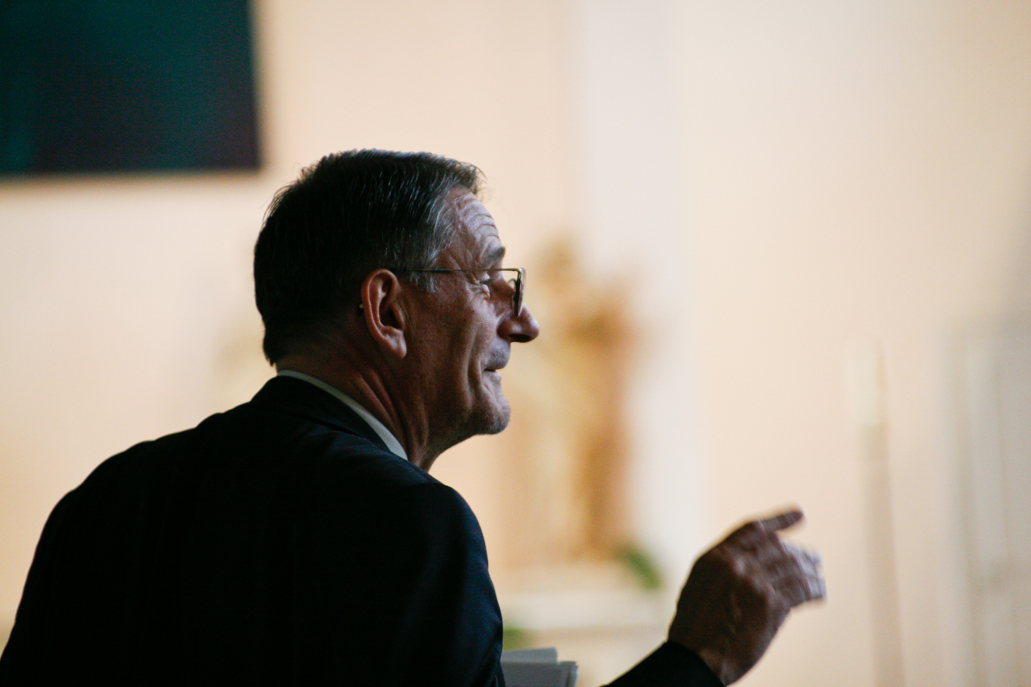 Prof. Hinderk M. Emrich im 1. Festival der Philosophie am 30.05.2008 in der Neustädter Hof- und Stadtkirche Hannover, Vortrag: "Wenn die Seele krank wird: Depression"